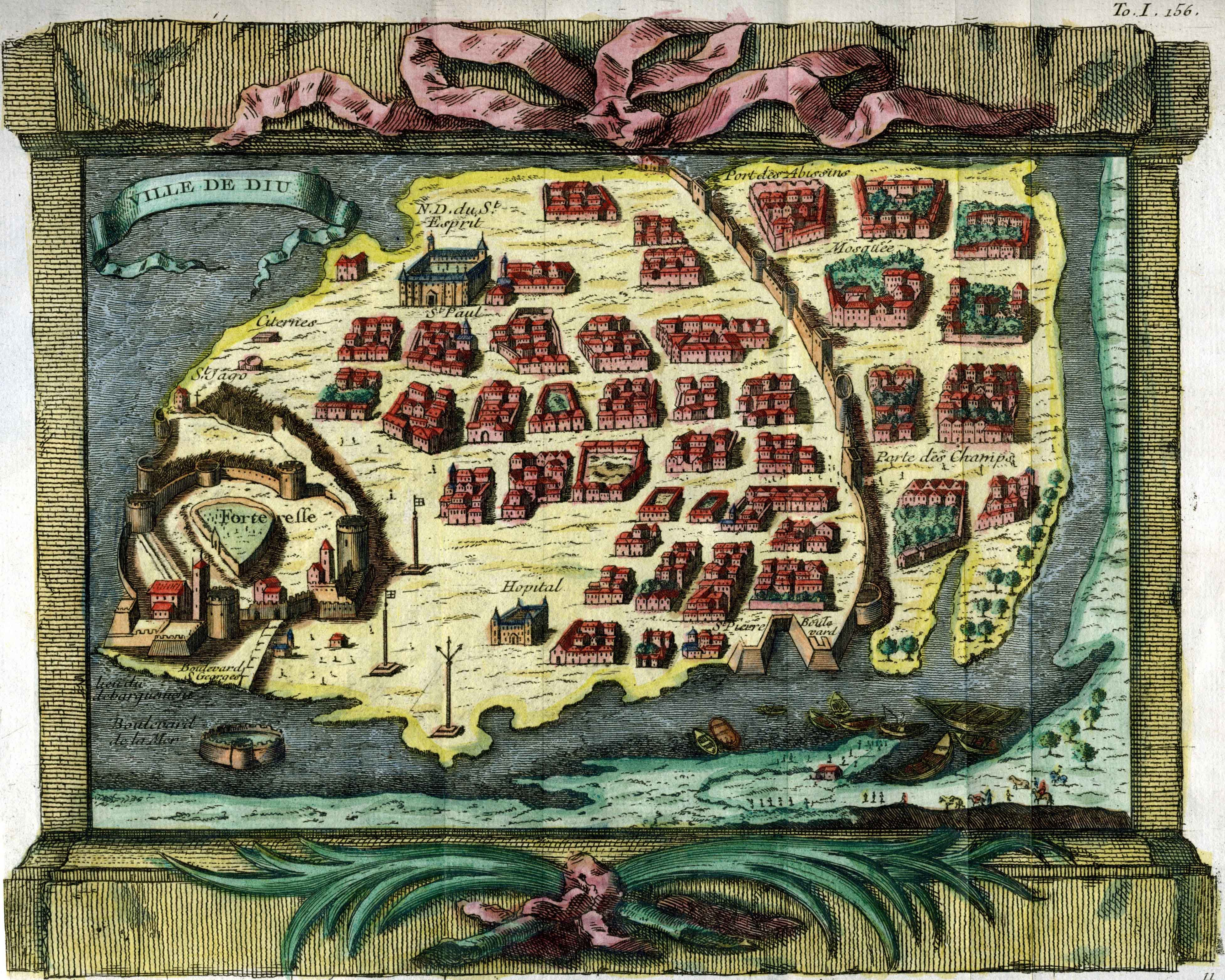 Ville de Diu en Inde, in histoire générale des voyages, Didot. 1750